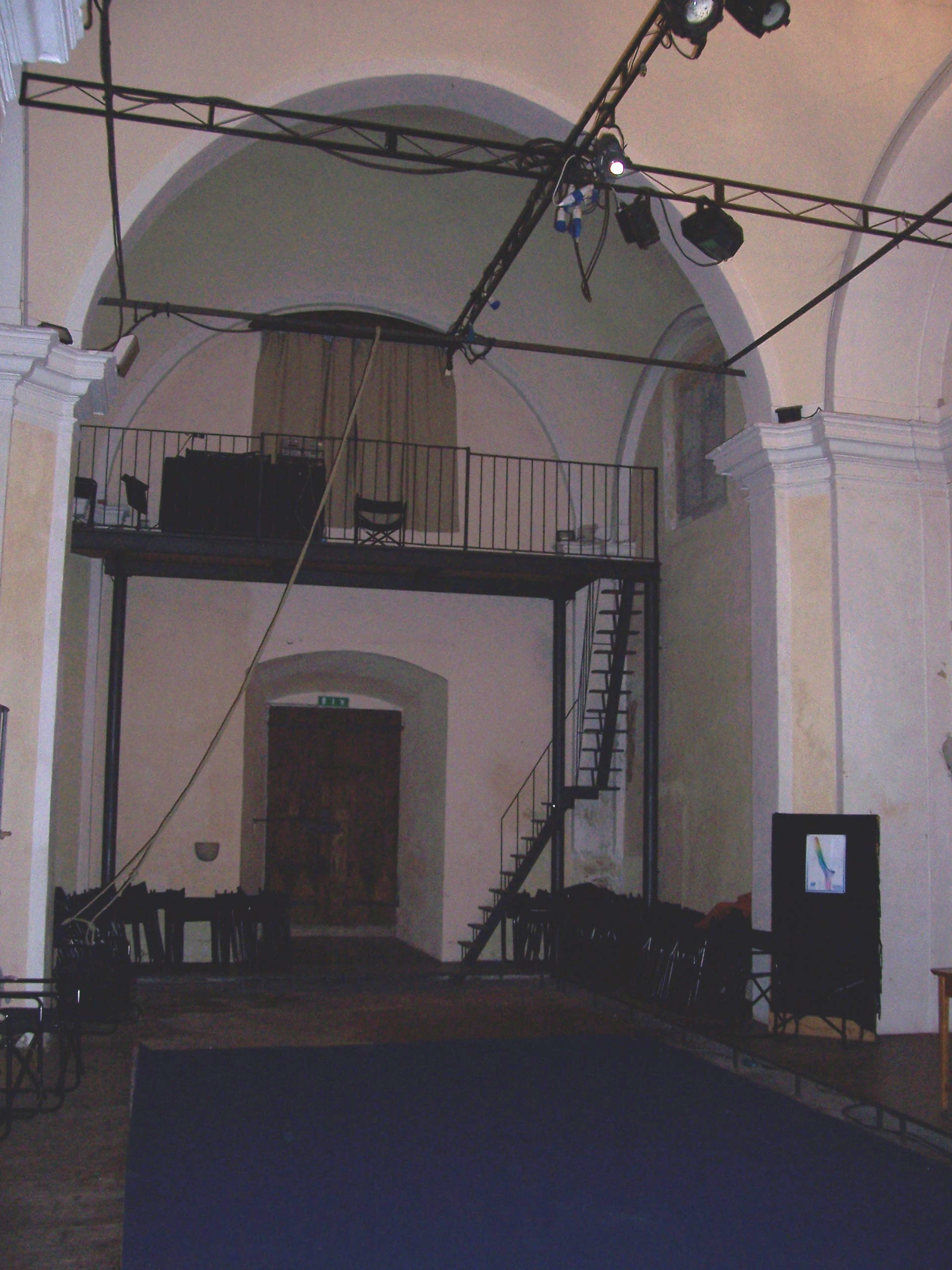 san desiderio brescia controfacciata.jpg